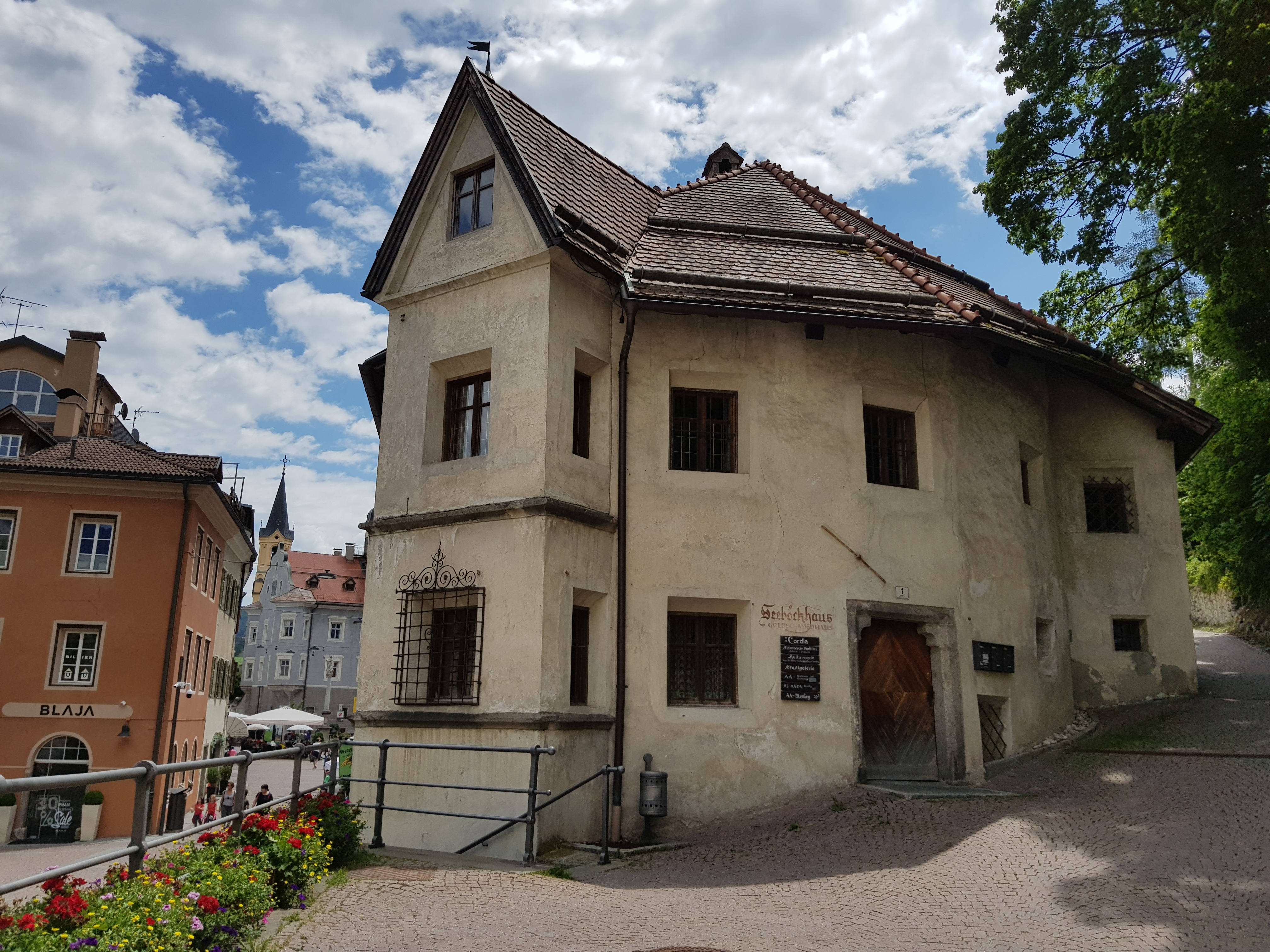 Seeböckhaus, Oberragen 4, Bruneck, Südtirol